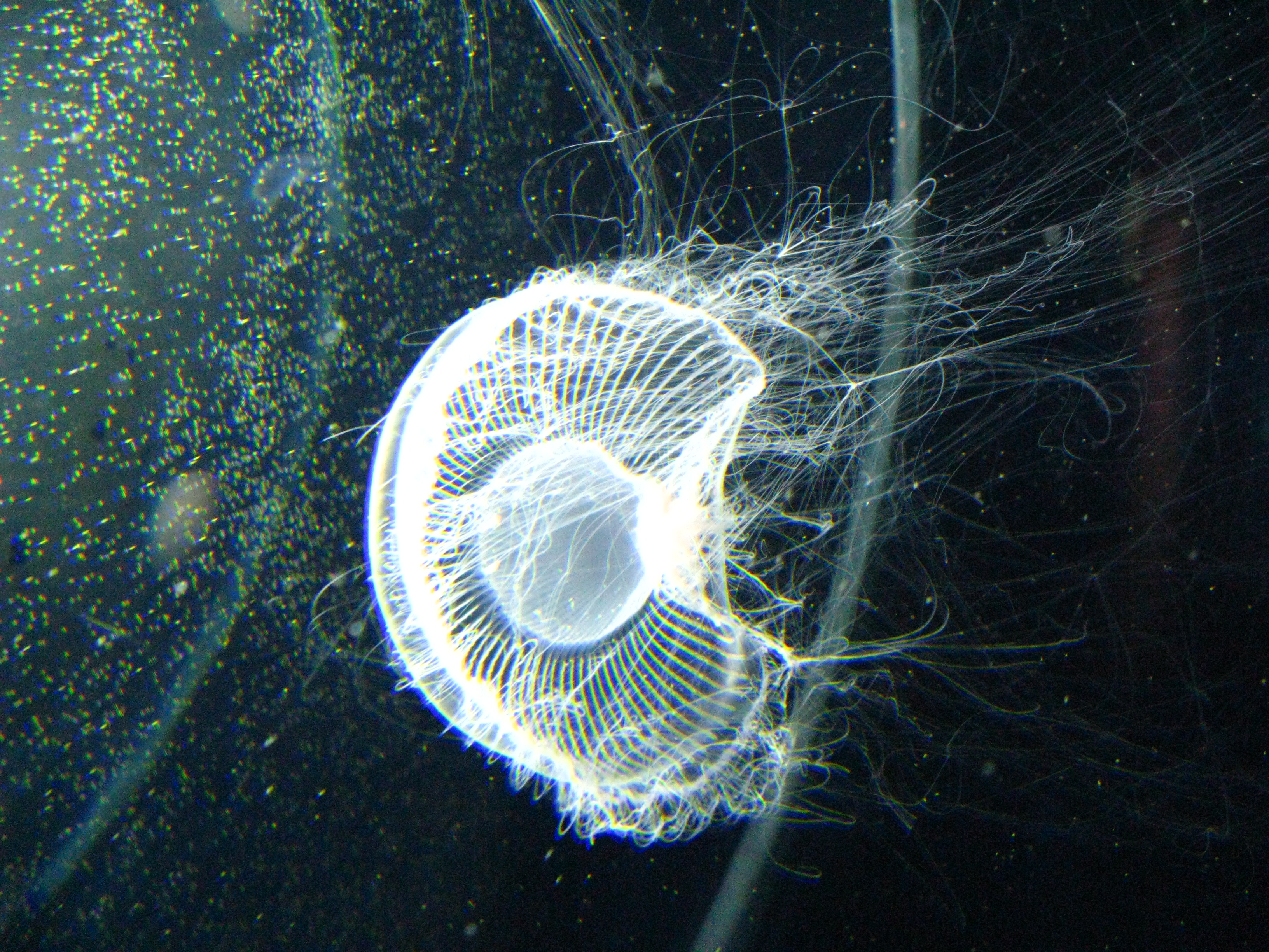 Scientific name Aequorea coerulescens